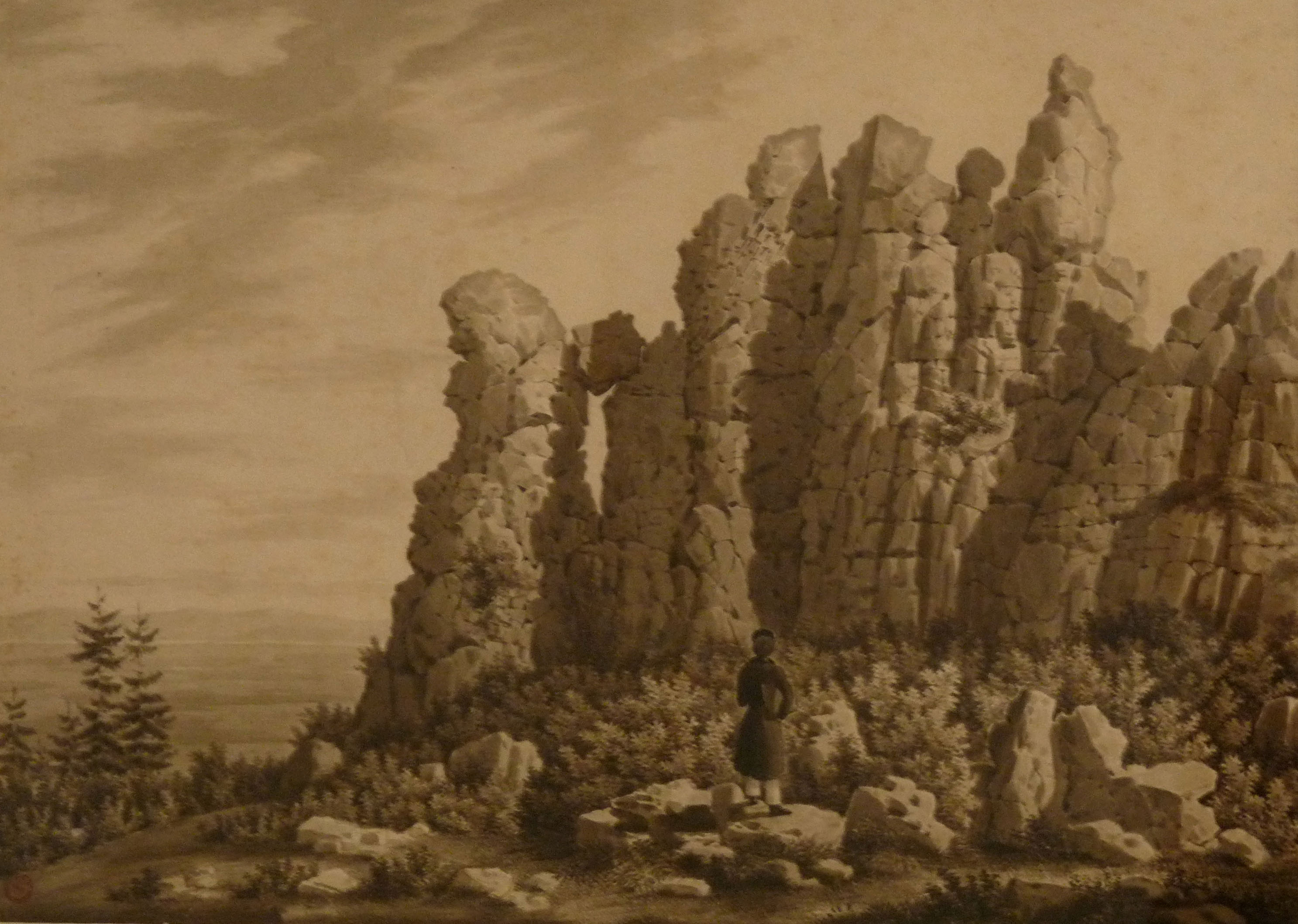 Le_Schlüsselstein_près_Bergheim, Jacques Rothmuller, crayon, aquarelle sur carton, vers 1839, Cabinet des estampes et des dessins de Strasbourg.